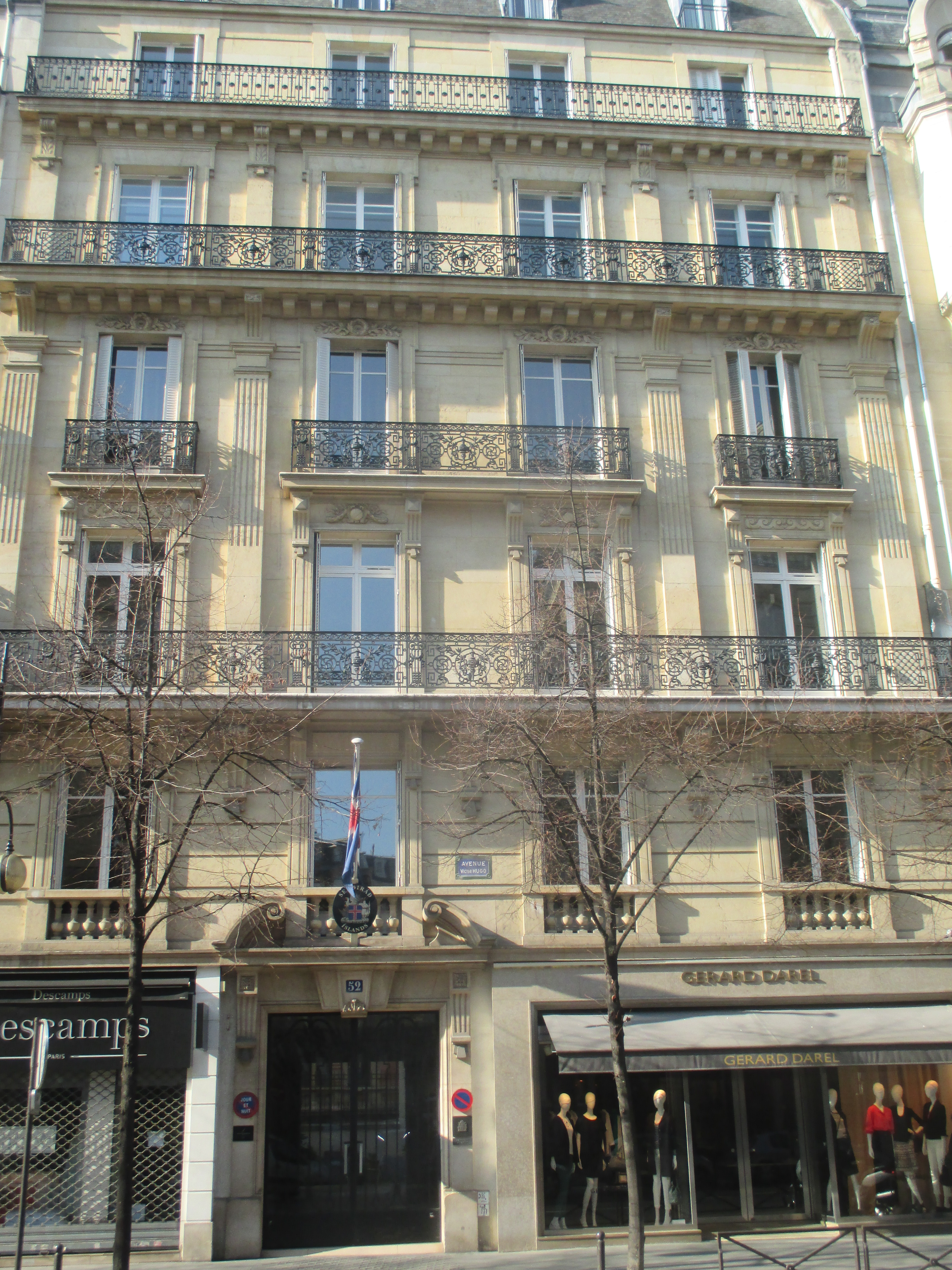 52 avenue Victor Hugo (Paris XVIe). L'ambassade d'Islande se trouve au premier étage.